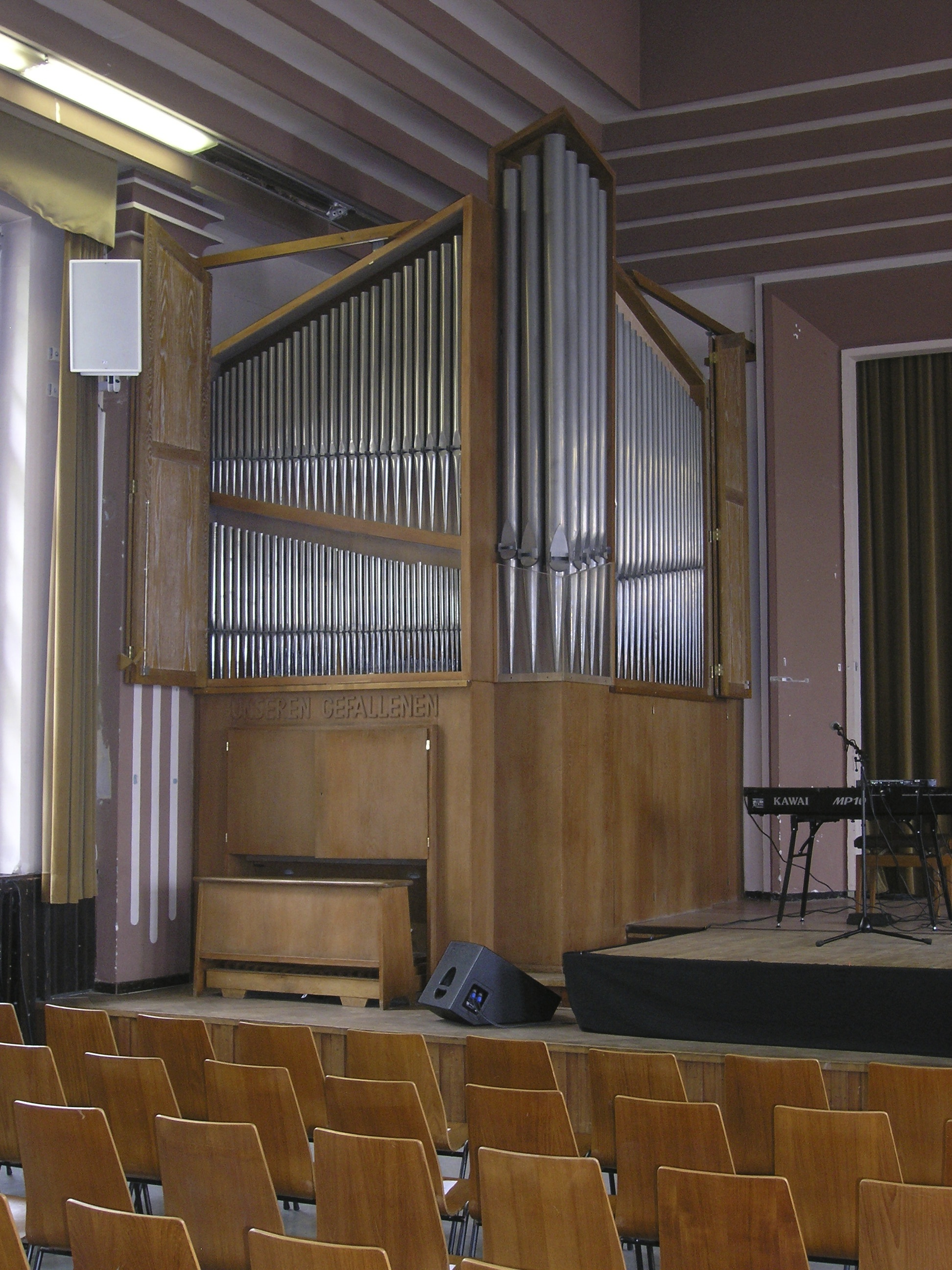 Die Walcker-Orgel in der Aula des Gymnasium Wendalinum in St. Wendel.